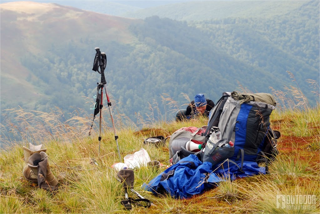 «Боржава», Виноградівський р-н ДП «Виноградівське ЛГ», Шаланківське л-во, квартал 1 (виділ 1-10), квартал 4 (виділ 1-9), квартал 7 (виділ 1-7), квартал 11 (виділ 1-7, 32, 33), квартал 14 (виділ 1-11)